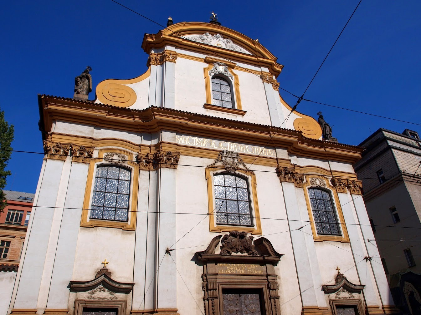 kostel Nejsvětější Trojice ve Spálené ulici